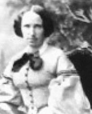 Alette Wilhelmine Georgine Due, född Sibbern